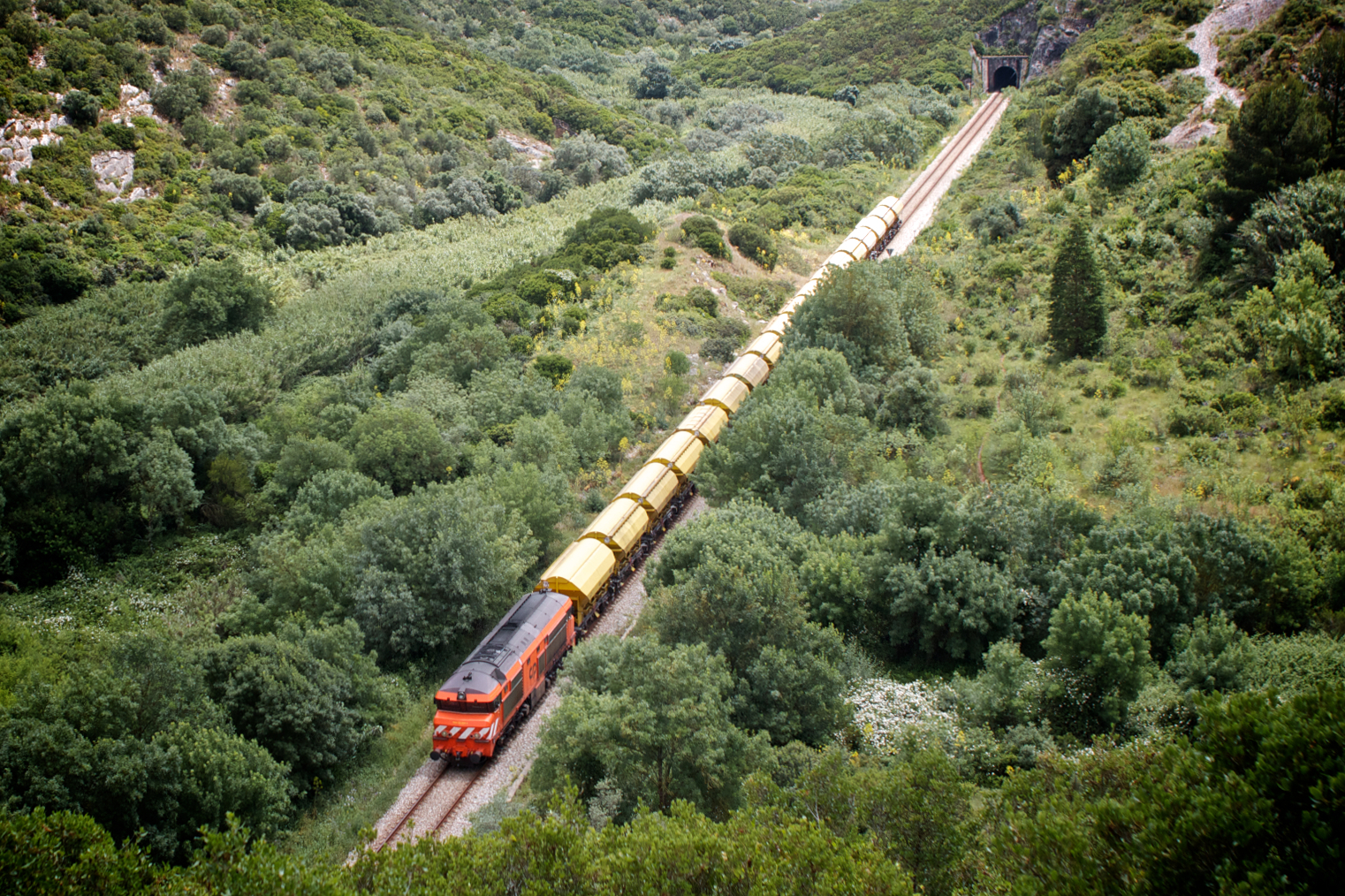 Tipo: Comboio de Transporte de Cereais 95216 [Bobadela - Ramalhal] Local: Torres Vedras [Linha do Oeste, PK 63] Data e hora: 19 de Maio de 2011 [12h56] Material: Locomotiva 1905 + 18 vagões CP Tdgs